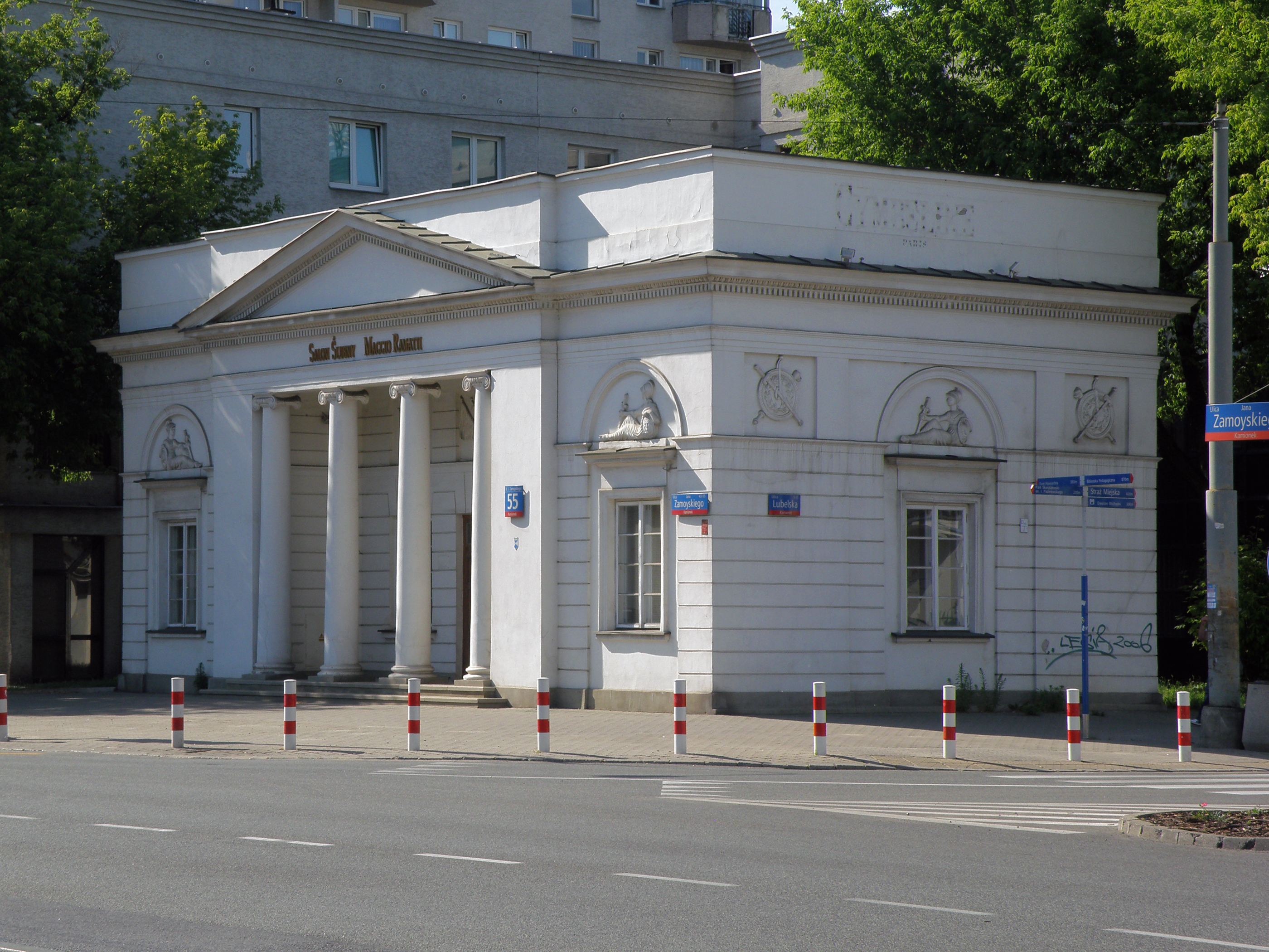 Warszawa, Praga Południe, Rogatki Grochowskie